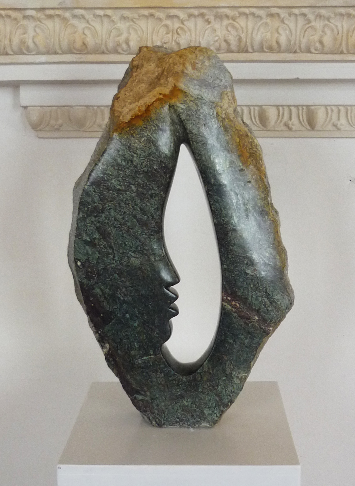 Skulptur von Ronika Tandi (geb. 21.04.1975 in Kariba, Simbabwe), aufgenommen im Kloster Benediktbeuern